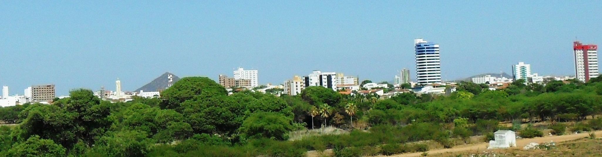 Vista Parcial de Patos